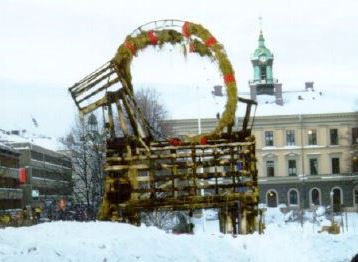 Julbocken i Gävle efter att den brunnit julen -98. Man ser de stora snöhögarna efter snöovädret. Foto: Mikael Johansson